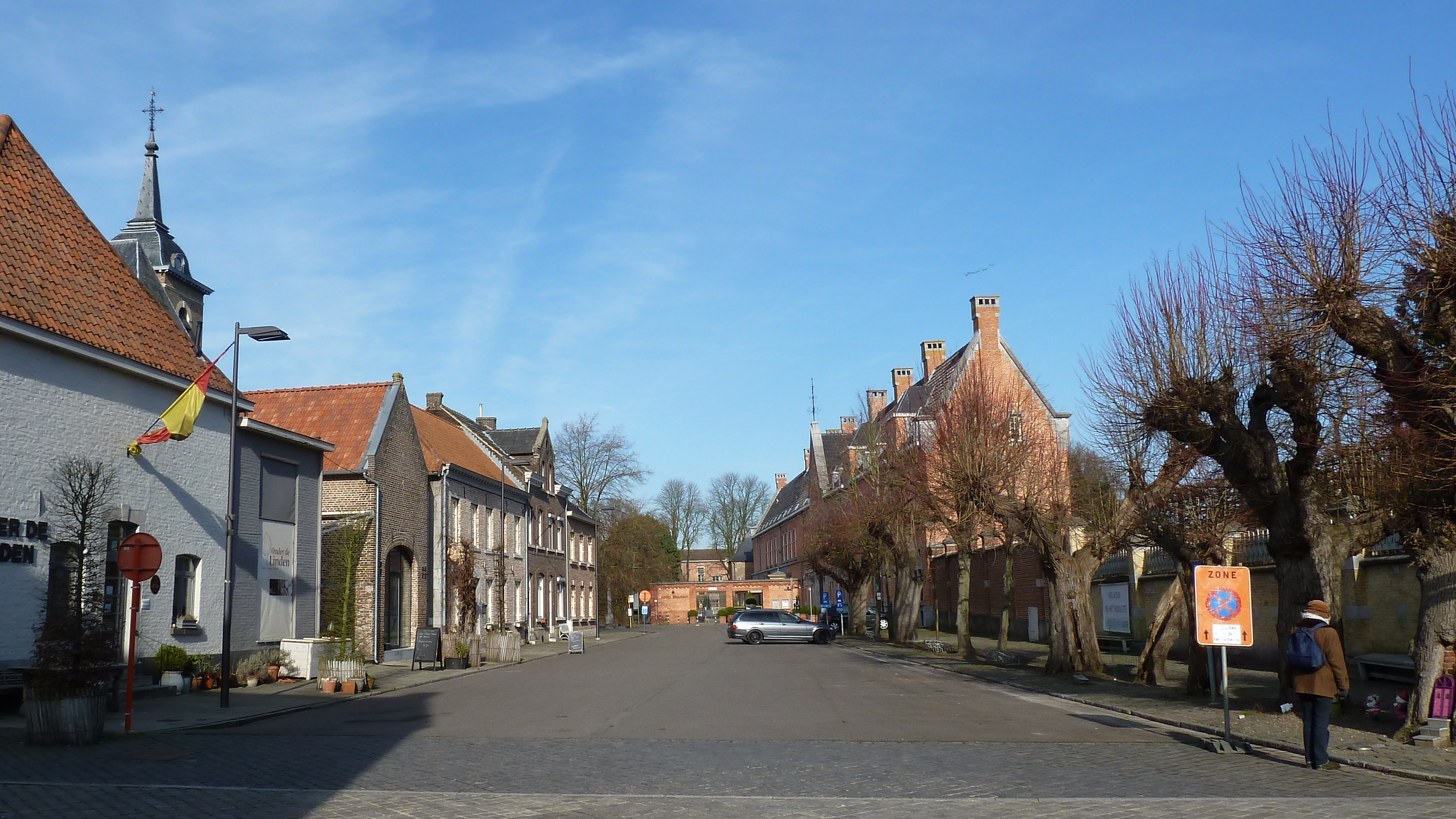 Onder de Linden, Oud-Rekem, Limburg, België